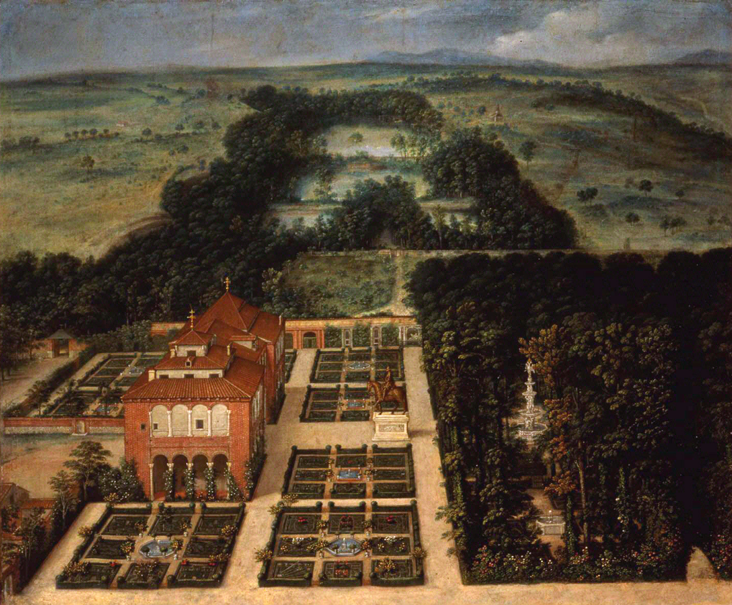 Vista del Palacio de los Vargas. Casa de Campo. Félix Castello, 1637. Museo de Historia de Madrid.